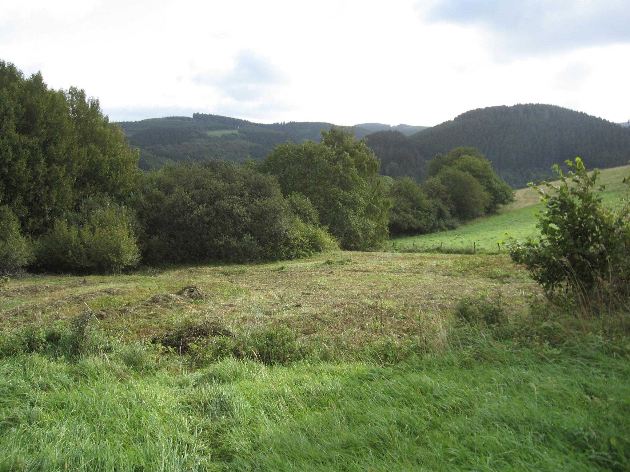 NSG „Grünlandbrache südöstlich von Hagen“ nach dem Mähen durch den Landschaftspflegetrupp der Biologischen Station HSK vom westrand des NSG.